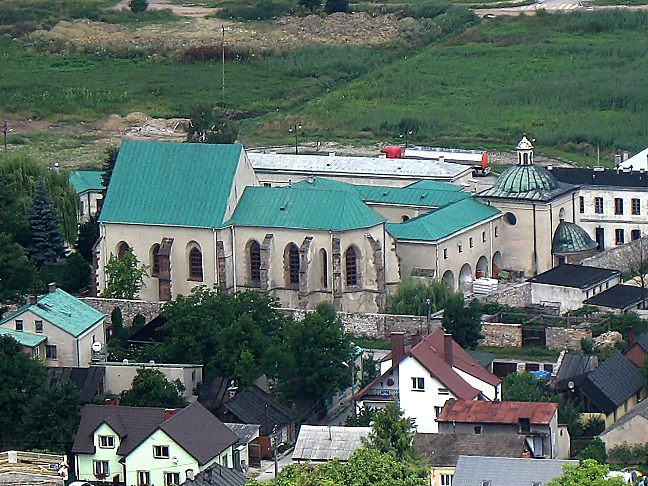 widok z zamku 232/1-6 z 15.02.1967.